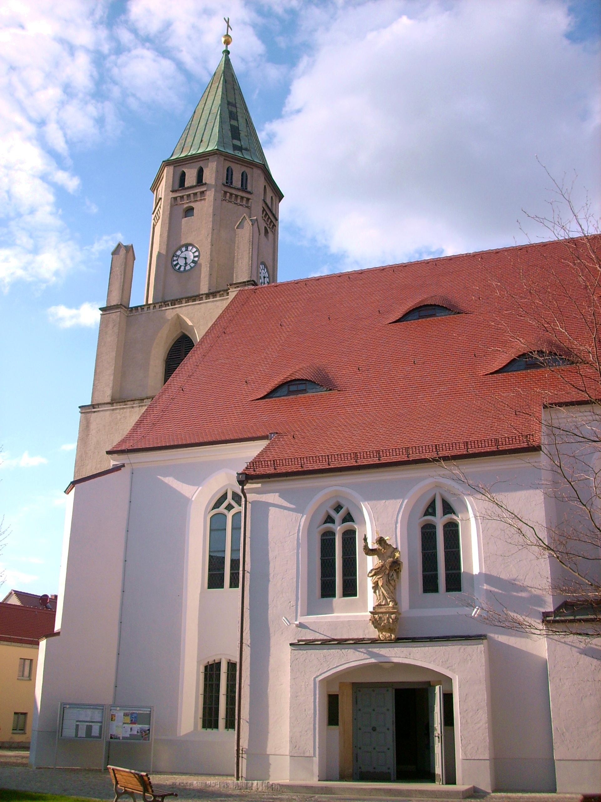 Katholische Pfarrkirche in Wittichenau